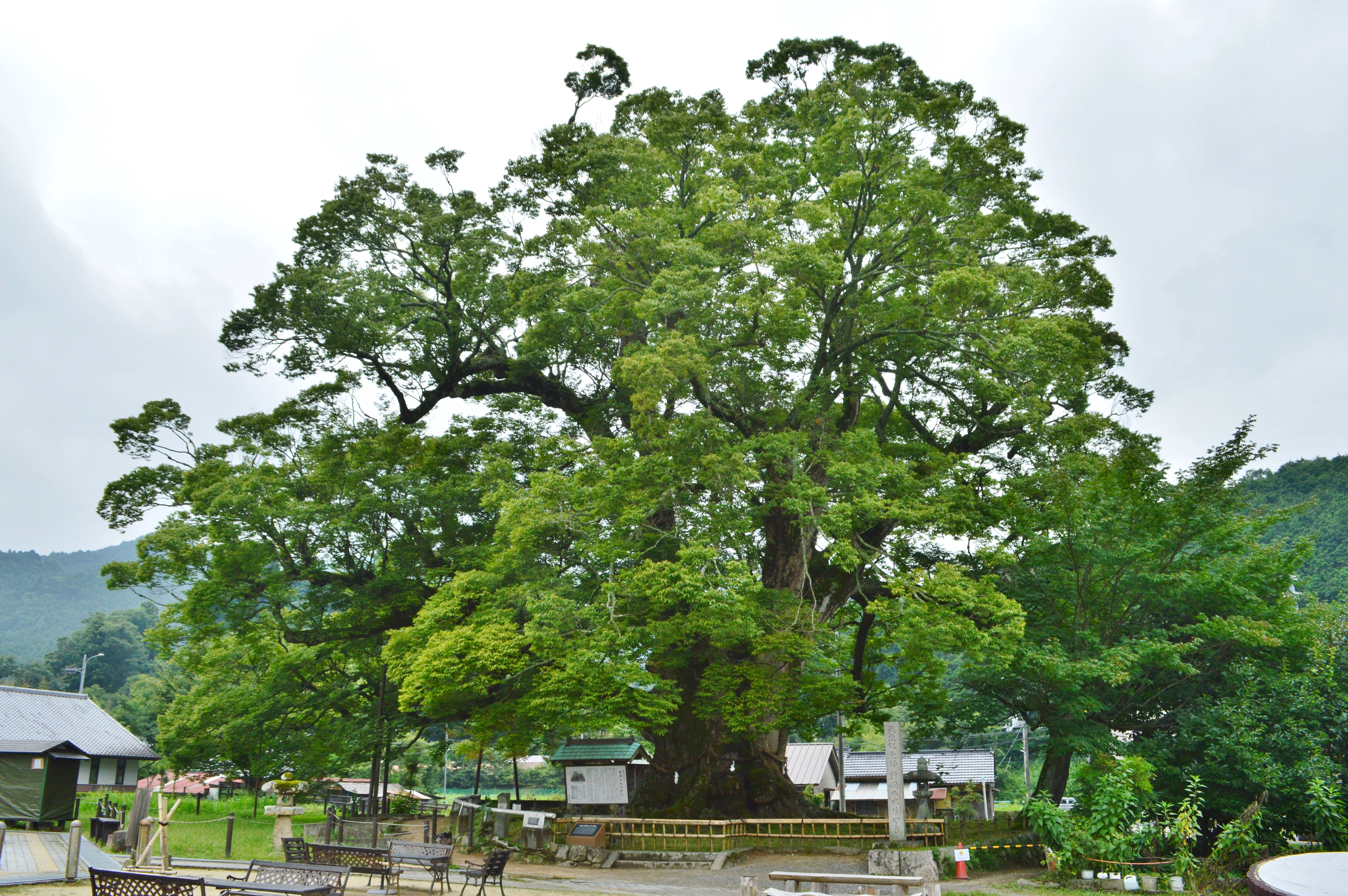 野間の大ケヤキ 全景